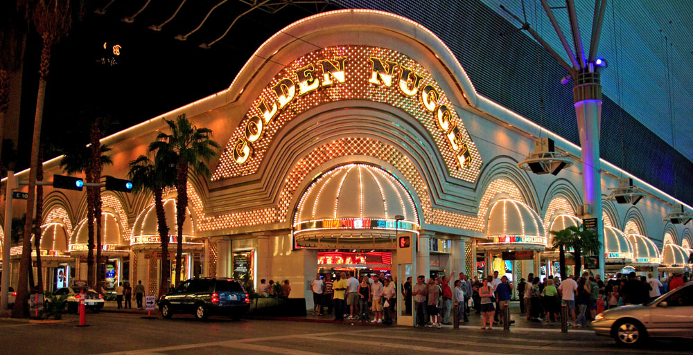 The Golden Nugget Las Vegas